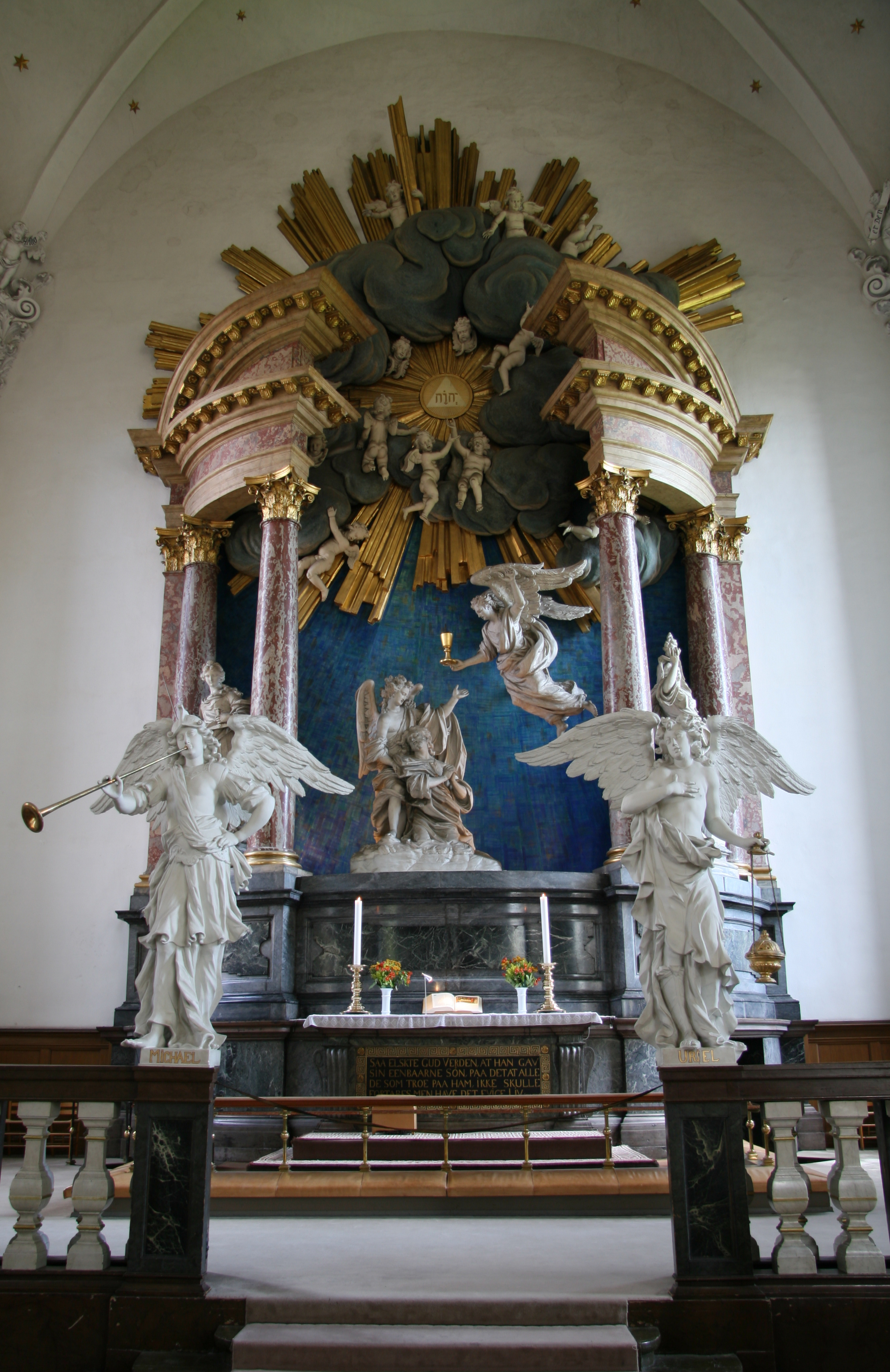 Vor Frelser Kirke (Church of Our Saviour), Copenhagen, Denmark. Altar